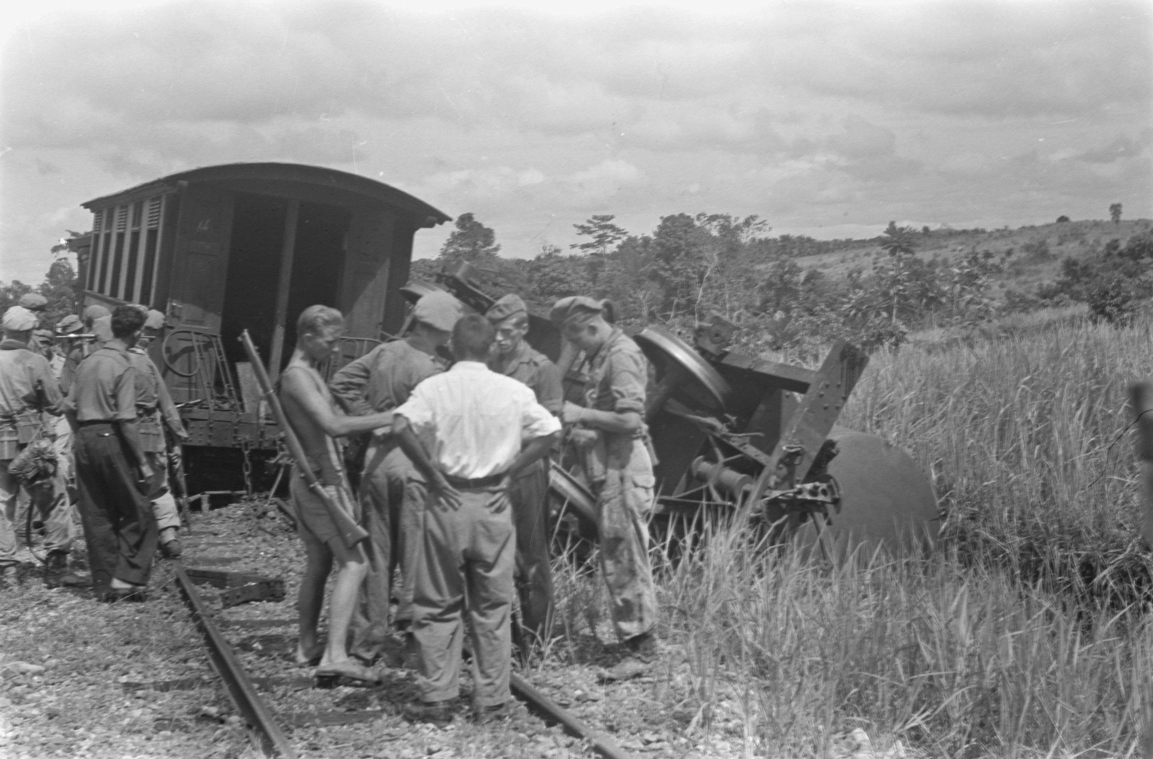 Collectie / Archief : Fotocollectie Dienst voor Legercontacten Indonesië Reportage / Serie : [DLC] Sepantjar bij Batoeradja Beschrijving : Spoorwagons zijn uit de rails gelopen (sabotage?). Een wagon ligt in het talud. Daarbij diverse militairen. Datum : 17 november 1947 Locatie : Baturaja, Indonesië, Nederlands-Indië, Sumatra Fotograaf : Staal. [...] / DLC Auteursrechthebbende : Nationaal Archief Materiaalsoort : Negatief (zwart/wit) Nummer archiefinventaris : bekijk toegang 2.24.04.03 Bestanddeelnummer : 430-1-4